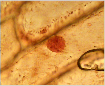 Objekt: Zwiebel(Allium cepa) Zellkern Vergrößerung: 400x Färbung: Jod Aufgenommen von: zituba